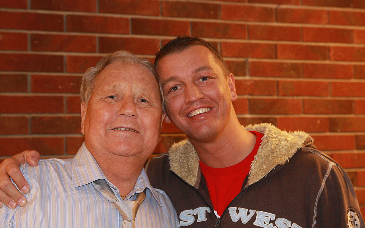 John og Ole Klemetsen